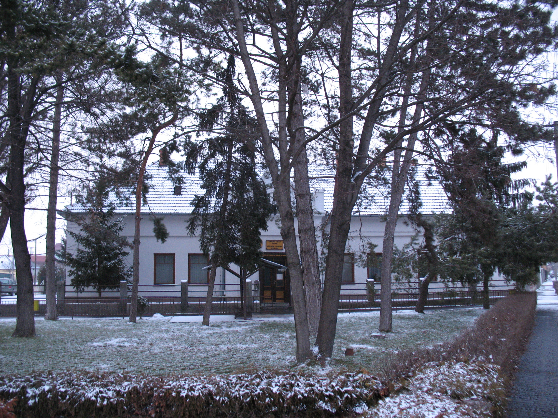 Negyed